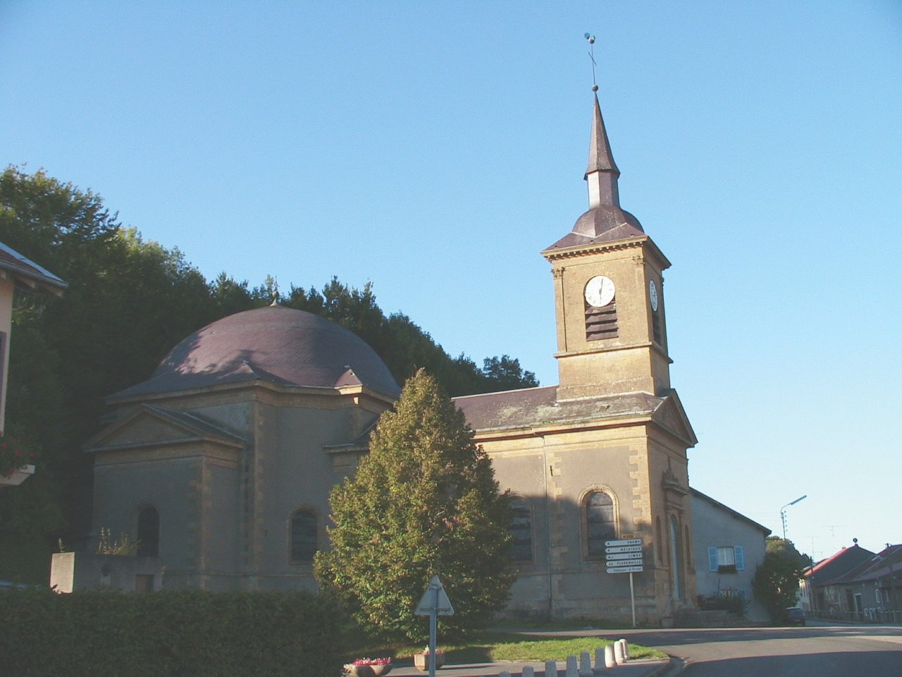 L'église de Breux (France)